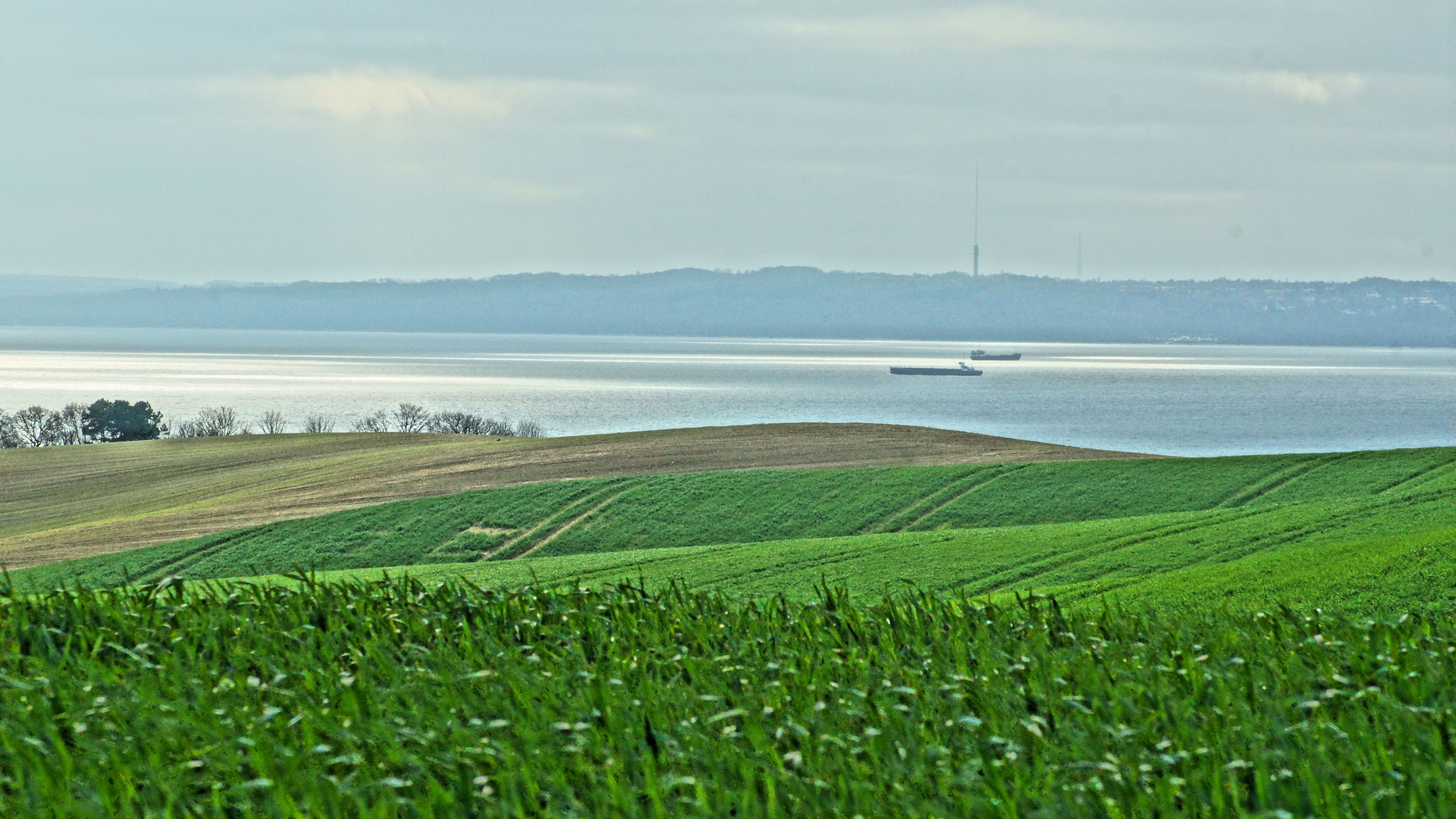 Århus Bugt fra Isgårdsvej, Isgård